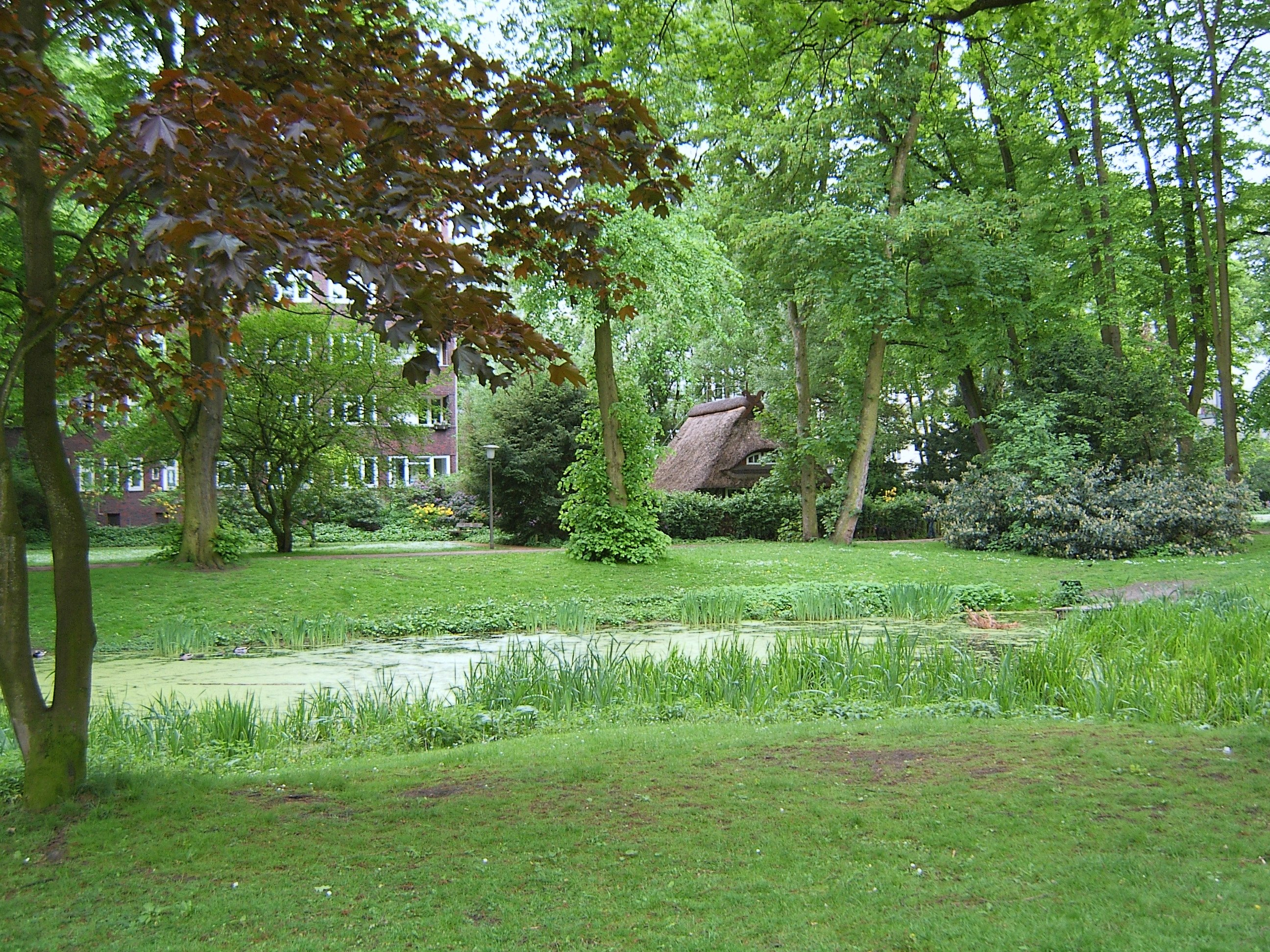 Kellinghusens Park in Eppendorf ist aus einem früheren Landhausgarten entstanden. Das Reetdachhäuschen, der Teich und einige alte Bäume stammen noch aus jener Zeit.